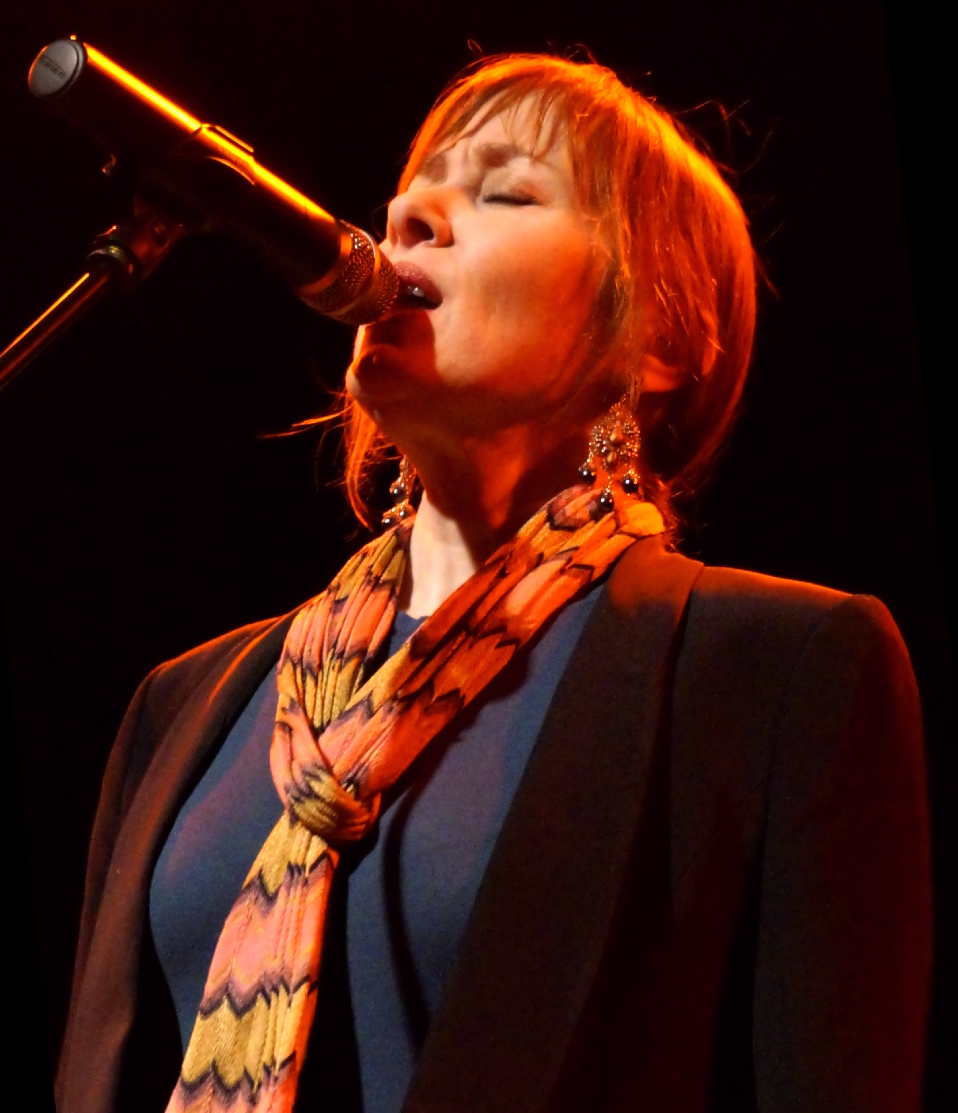 Die amerikanische Sängerin Suzanne Vega bei ihrem Auftritt in München am 12. Februar 2014